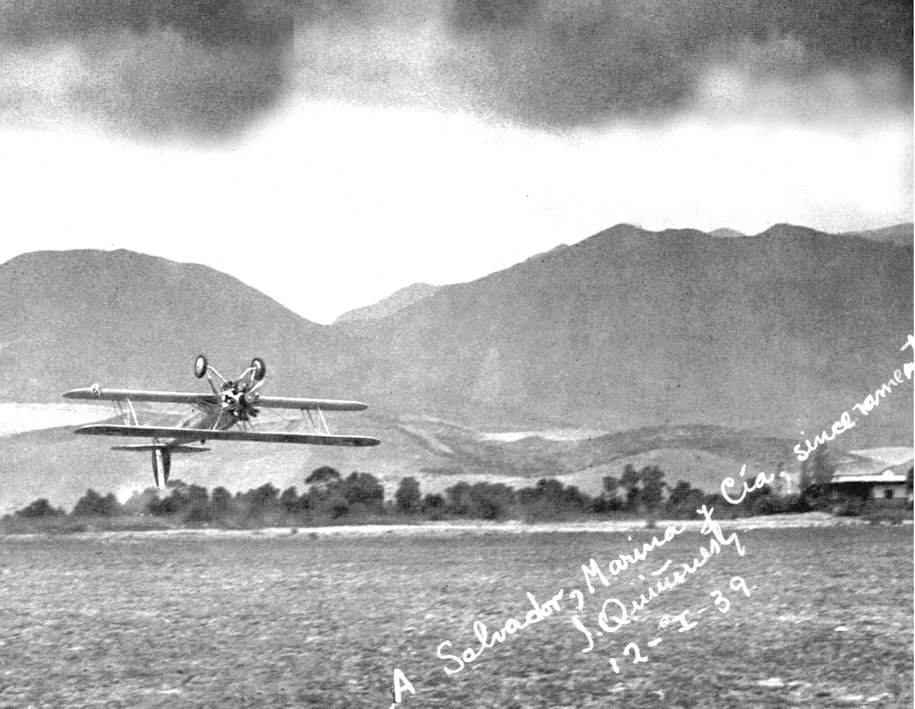 Vuelo Invertido de Quiñones durante su ceremonia de graduacion.